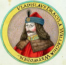 Vladislaus Dracula. Süddeutscher Miniaturmaler, um 1600. Wasserfarben auf Papier; Stammbuch des Nikolaus Ochsenbach, Blatt 74, Württembergische Landesbibliothek Stuttgart.